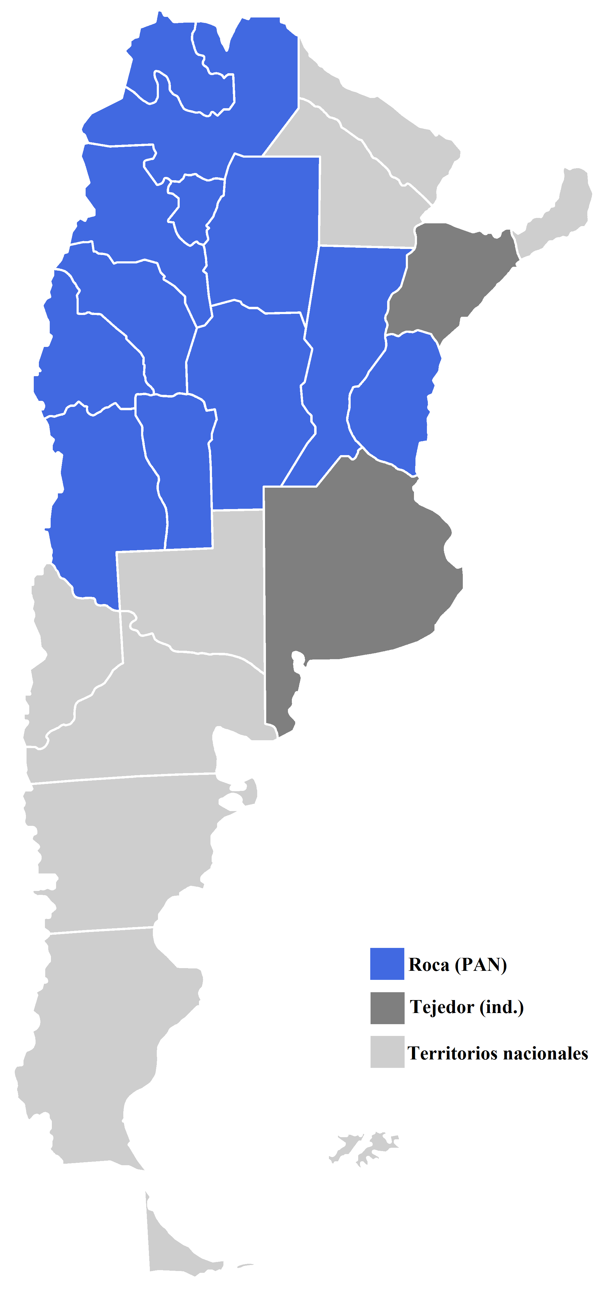 Mapa del resultado de las elecciones presidenciales de Argentina por provincia.